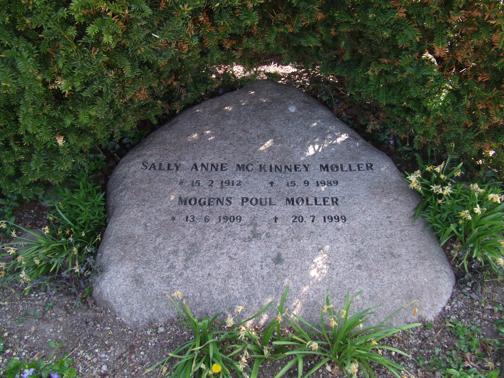 Sally Anne Mc Kinney Møllers gravsted på Buerup kirkegård